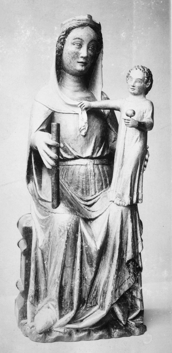 Muttergottes mit Kind, Renkumer Gnadenbild